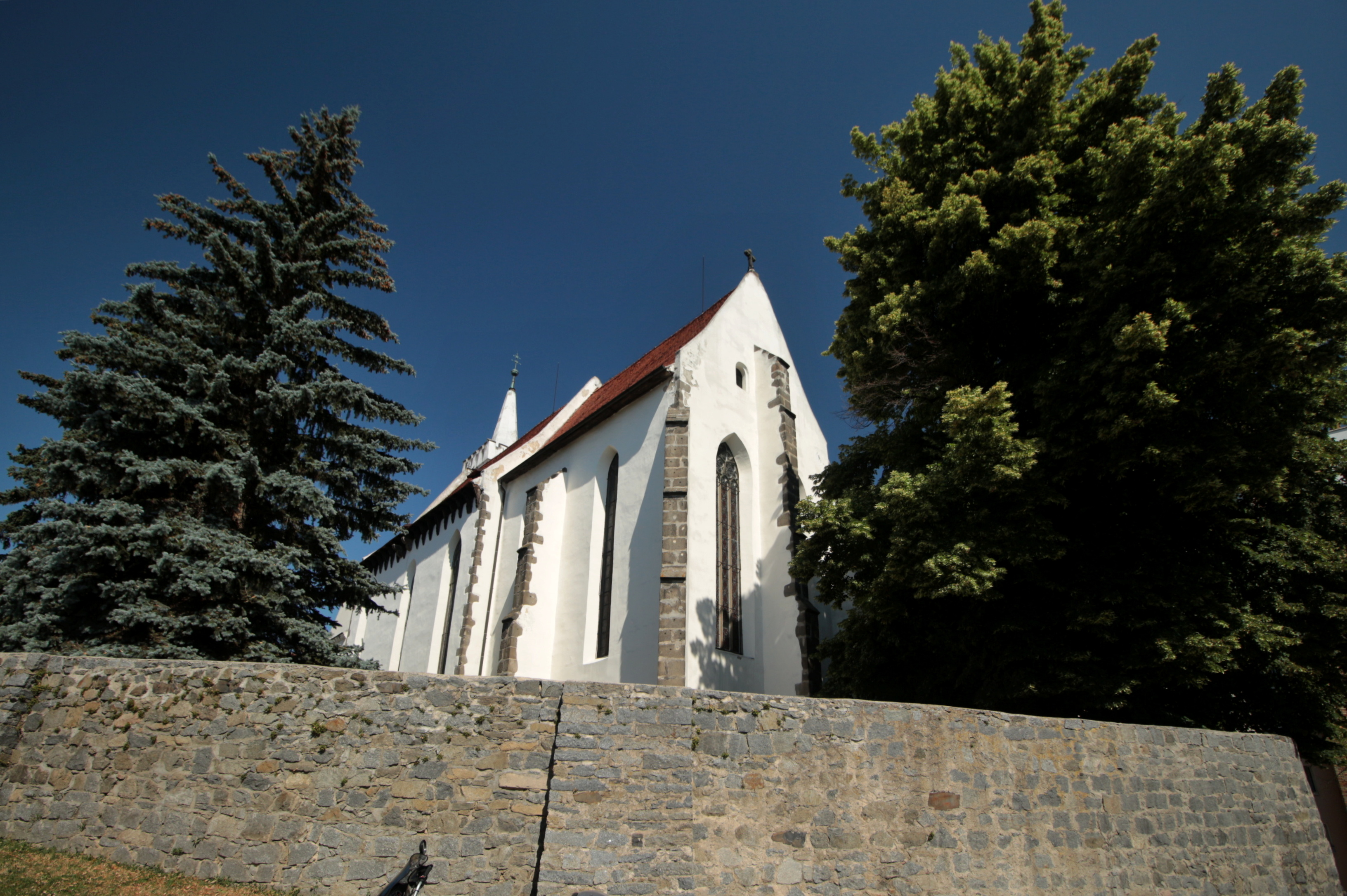 Sedlčany, kostel sv. Martina